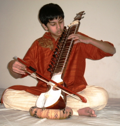 এস্রাজ (Esraj being played by Saquib, Dhaka, 31 December, 2010)